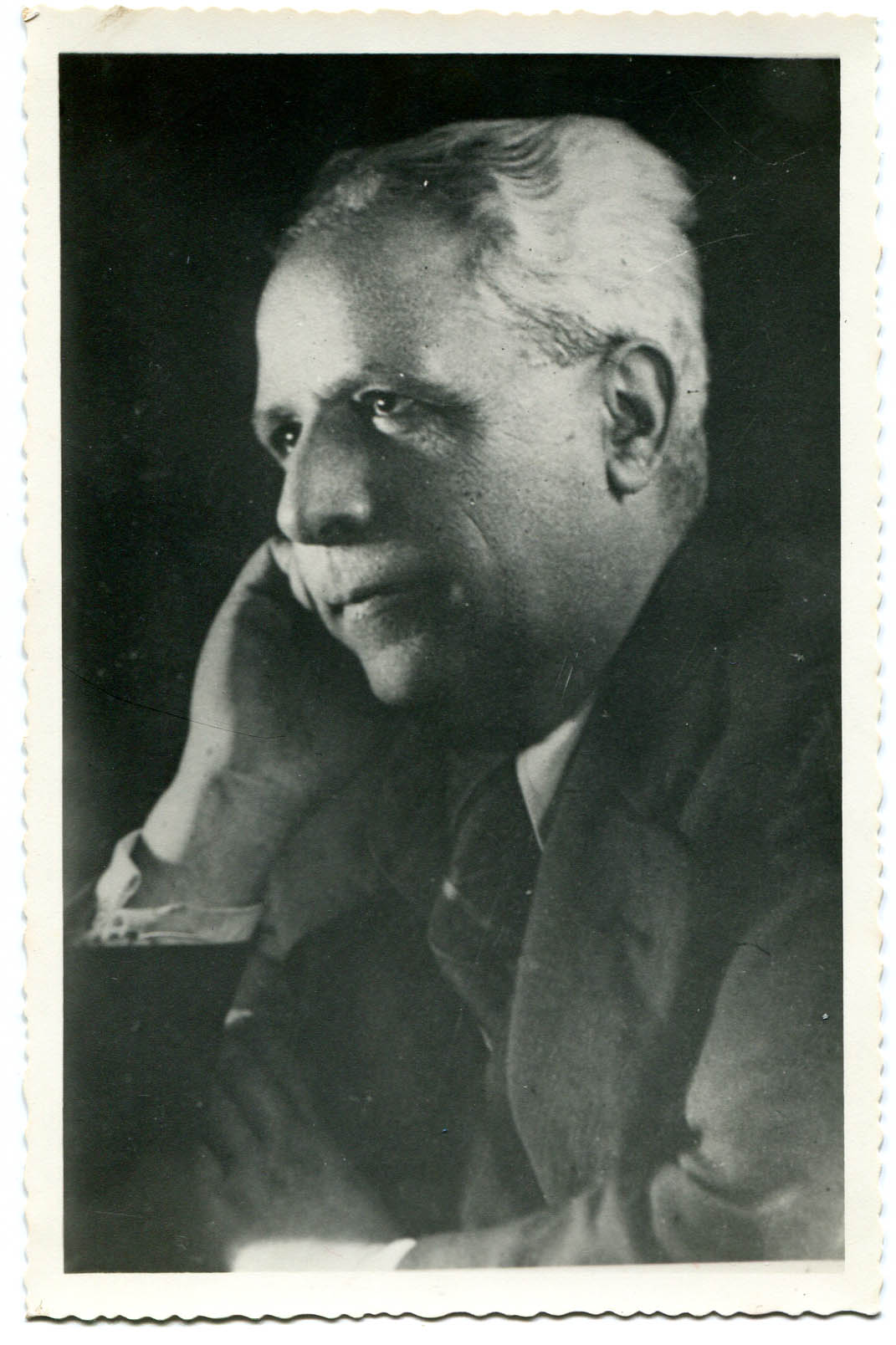 Foto ritratto di Giulio Bemporad